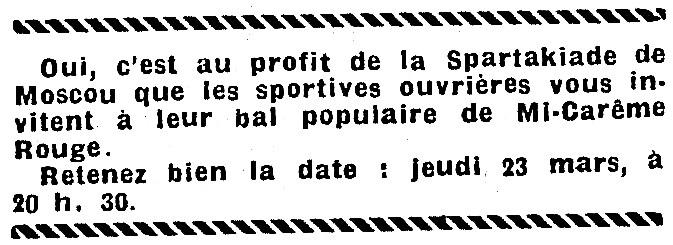 Annonce d'un bal de la Mi-Carême à Paris.